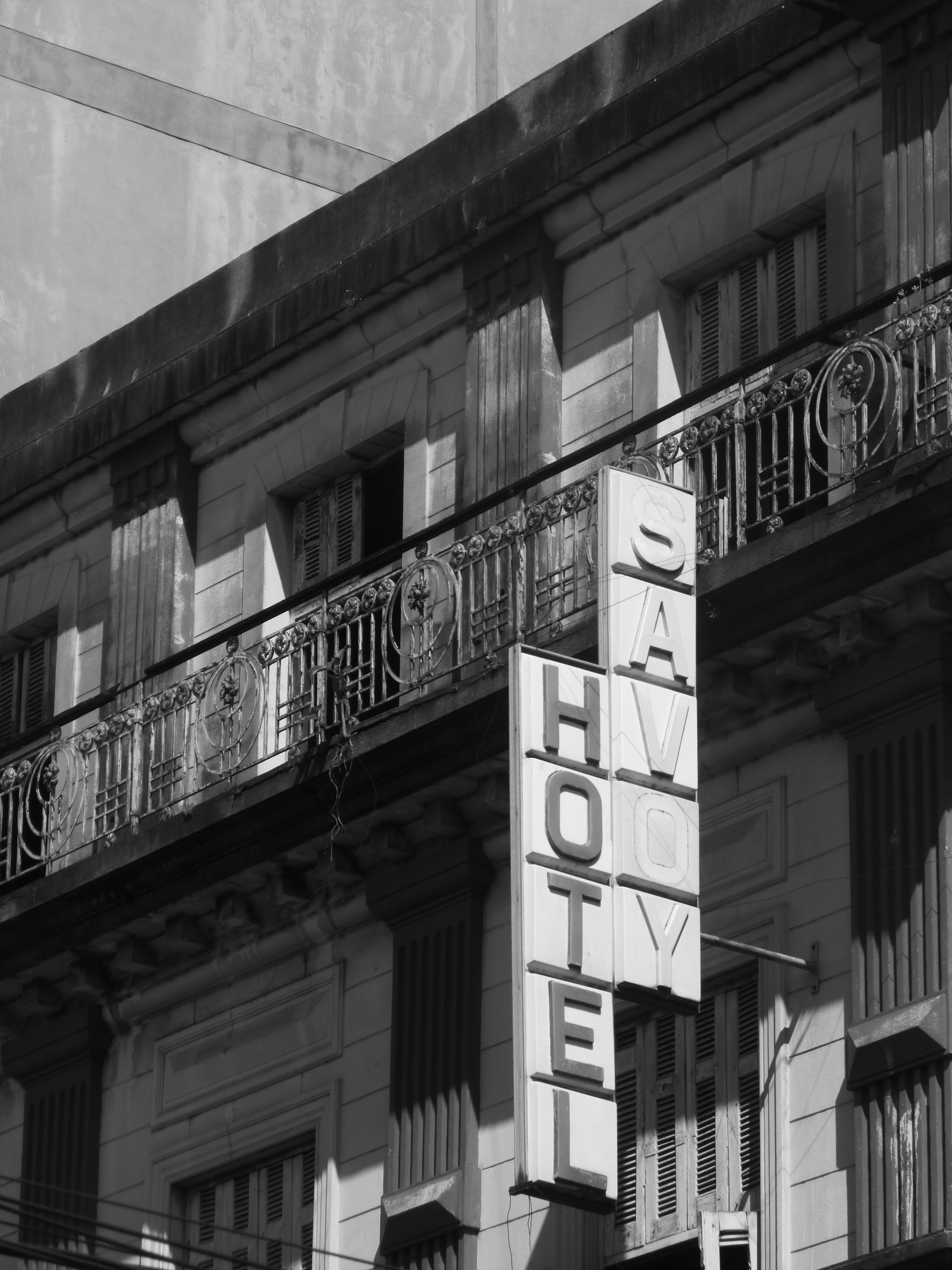 Construido en 1900, el hotel Savoy constituyó el eje de la vida social y cultural de Posadas. Cerrado hace más de una década, en el año 2003 fue declarado Monumento Histórico Arquitectónico. Hace poco se intentó su demolición, pero en el año 2012 fue aprobada una ley de expropiación y se emplazará en el lugar el futuro museo de la Civilización, Cultura e Inmigración.